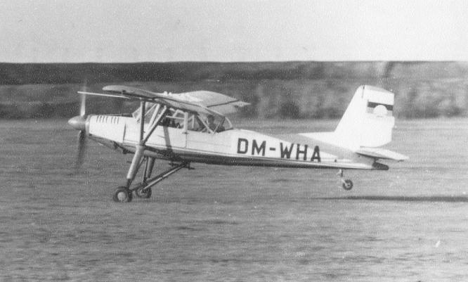 Aero L-60 (Kennung DM-WHA, Werknummer 151124, Registereintrag vom 03.02.1960 - 29.01.1974) beim Start vom GST-Flugplatz Schwarzheide während der 1. Bezirkswettkämpfe im Fallschirmsprung vom 20./21. Oktober 1962